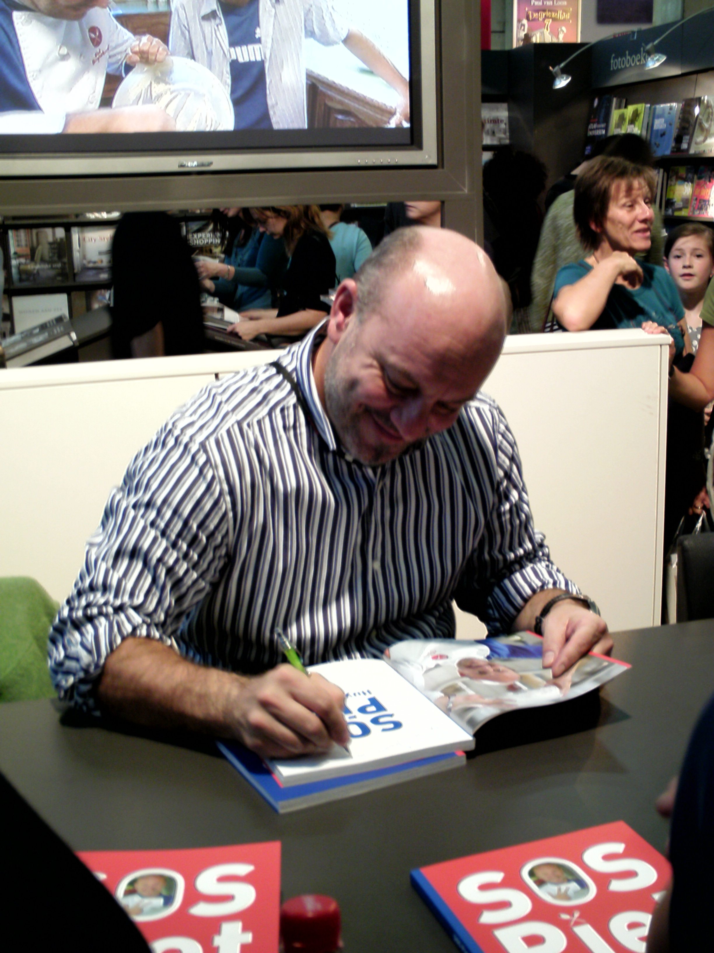 Piet Huysentruyt - Boekenbeurs Antwerpen 10-11-2008